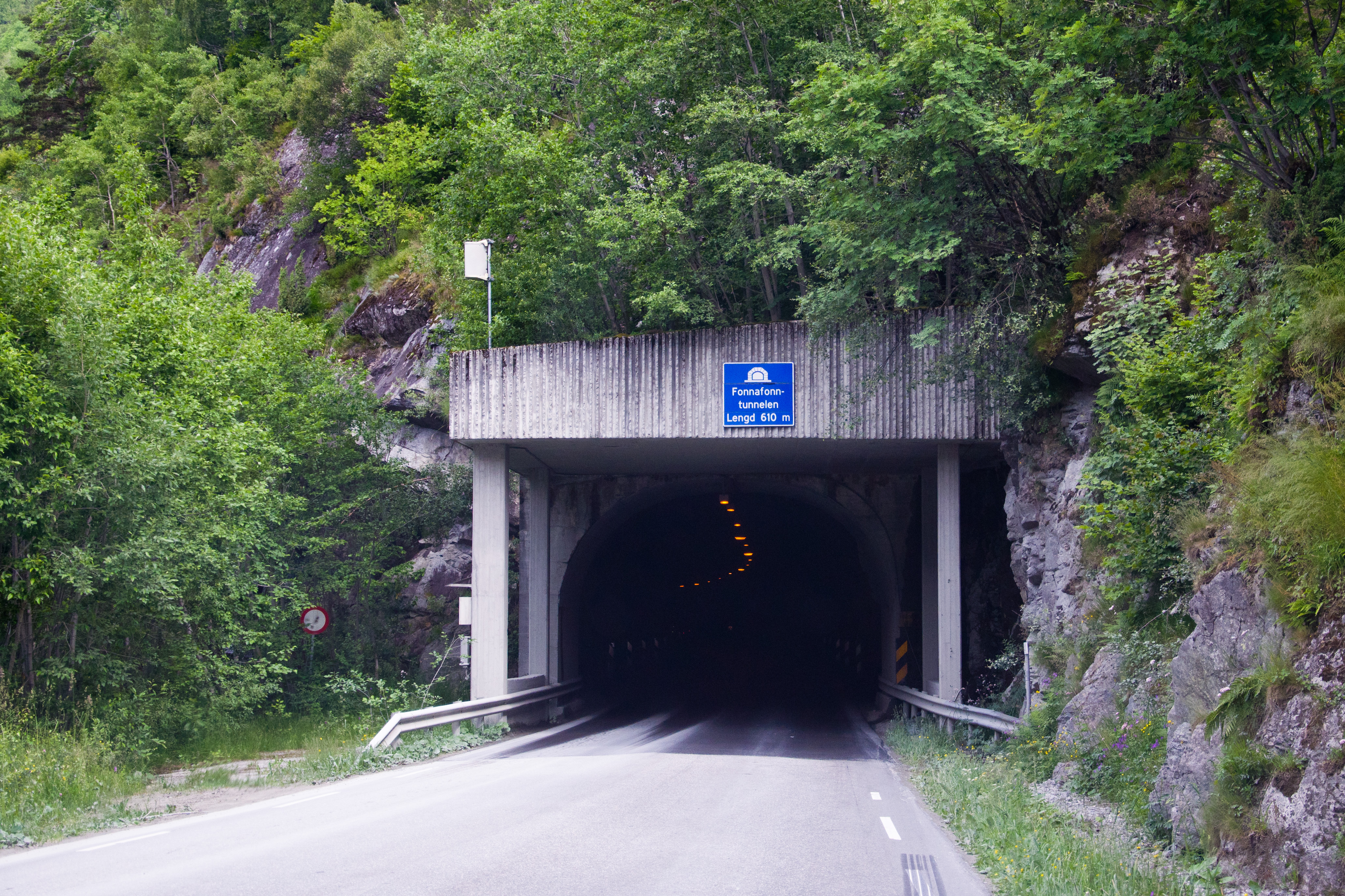 Fonnafonntunnelen på Riksvei 70 i Sunndal kommune, Møre og Romsdal. Søndre innslag.